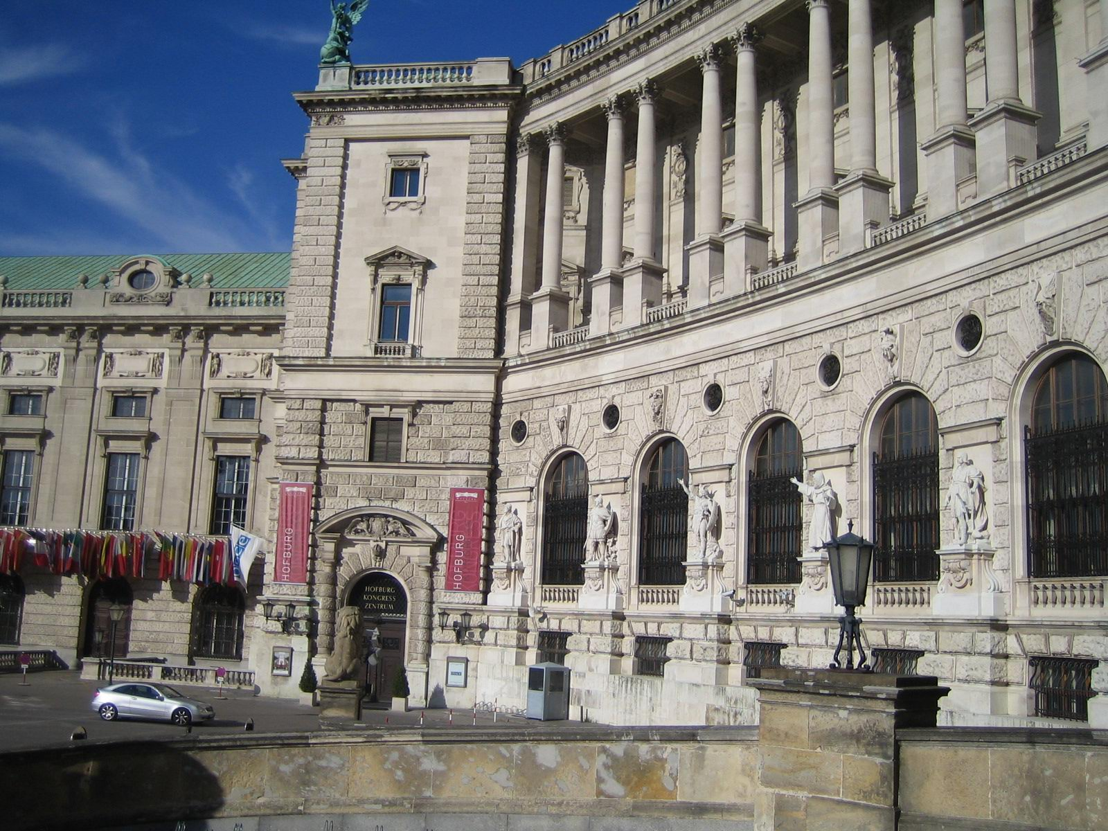 Ausschnitt der Fassade der Neuen Burg